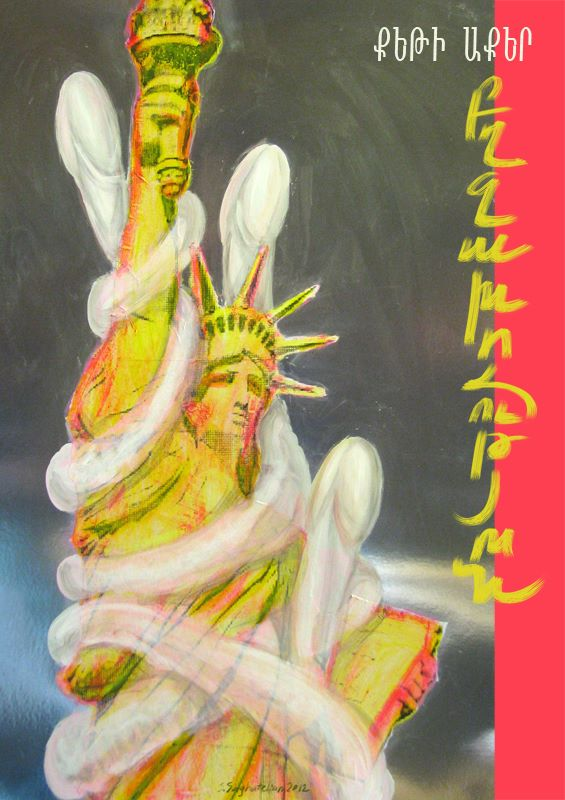 Քեթի Աքերի «Բղջախոհություն» վեպի հայերեն հրատարկության կազմը